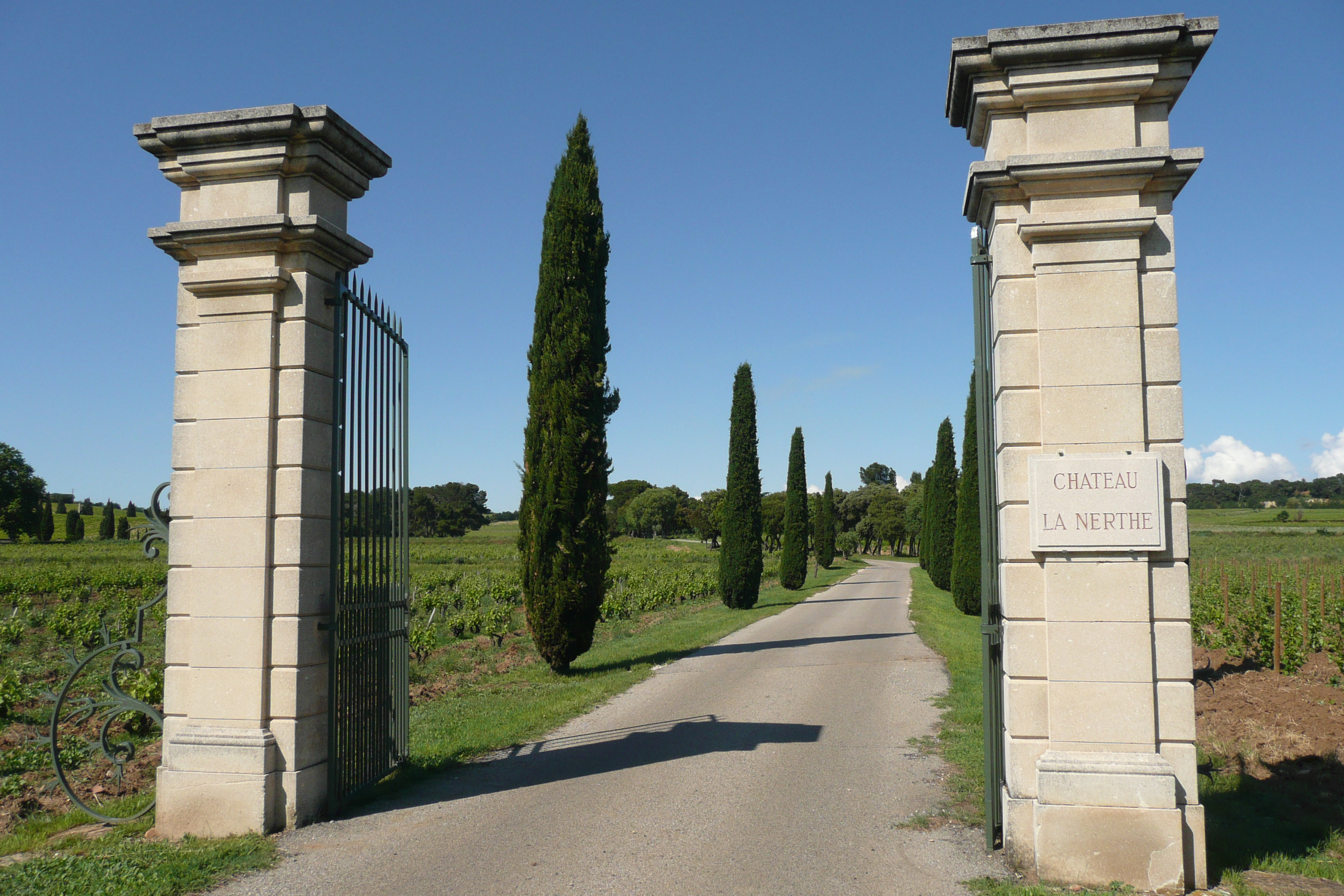 Entrée du château la Nerthe à environ 2,5 km de Châteauneuf-du-Pape.